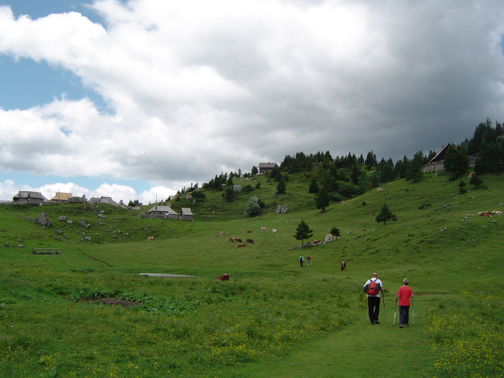 Velika planina, mountains in Slovenia. Taken by me in 2005.